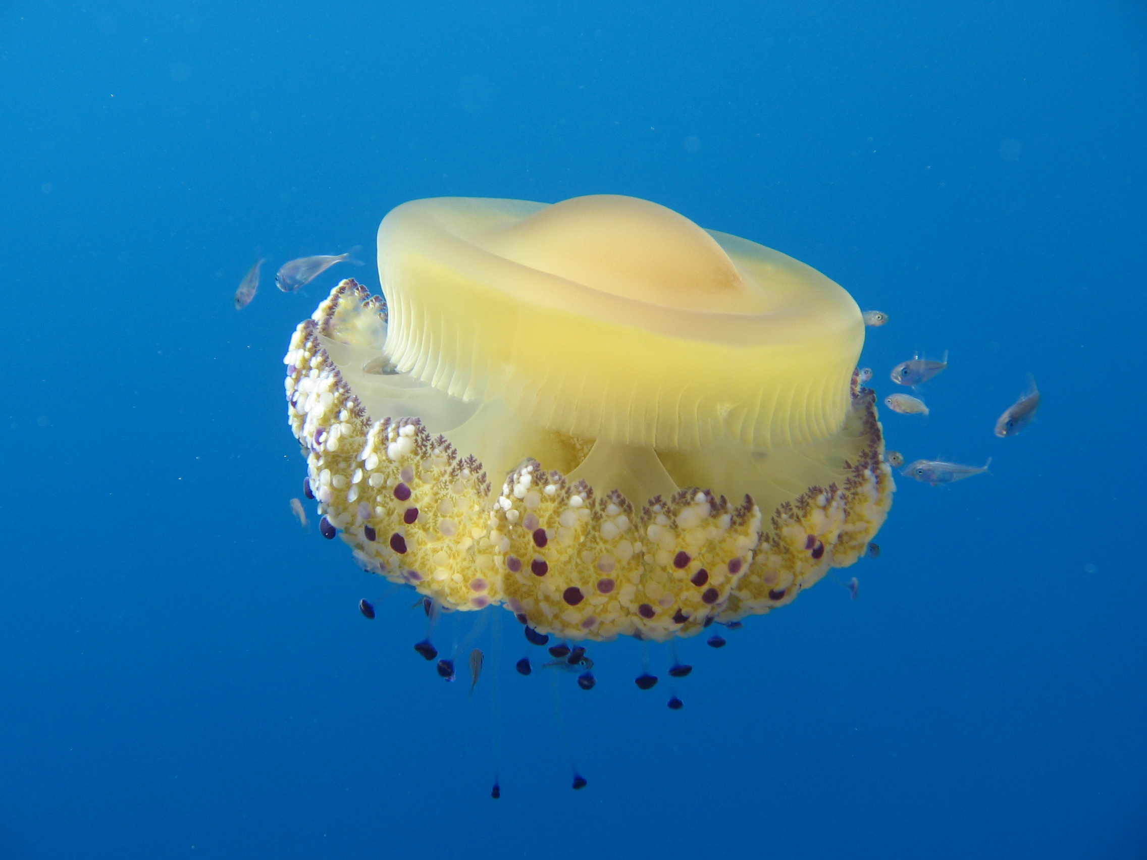 Cassiopea Mediterranea